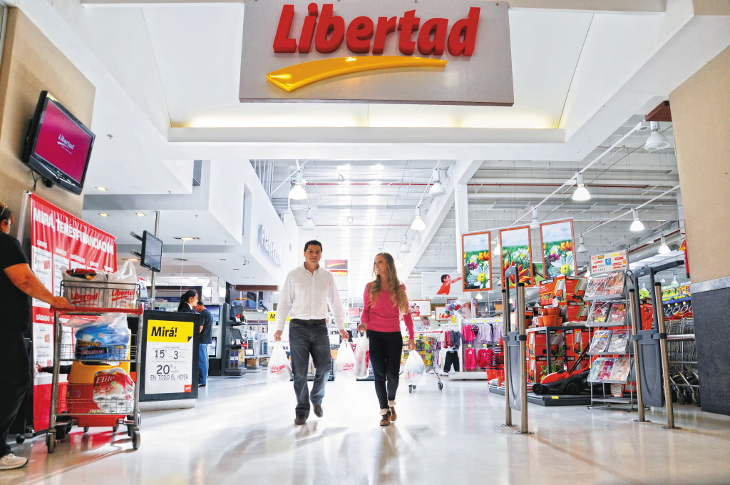 Supermarché Libertad en Argentine